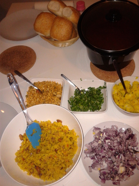 कांदा पोहे व इतर पदार्थ